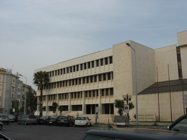 Caldas da Rainha (Portugal) - Câmara Municipal / Town Hall